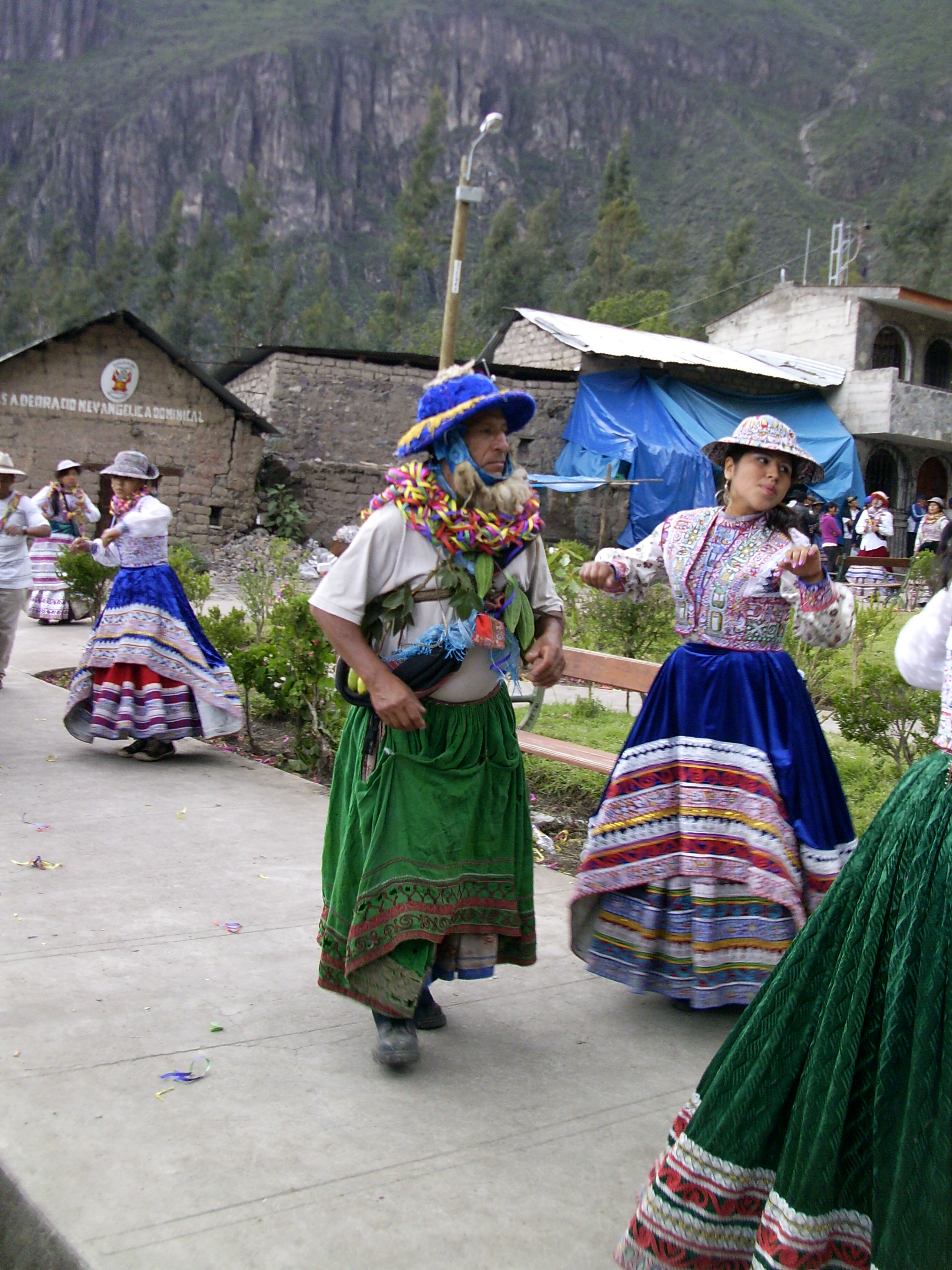 Fotos de la primera maravilla natural del Perú,en el Cañón más profundo del mundo.Cultura viviente natural intacta Tapay,junto con otras como los Kollawas y Cabanas